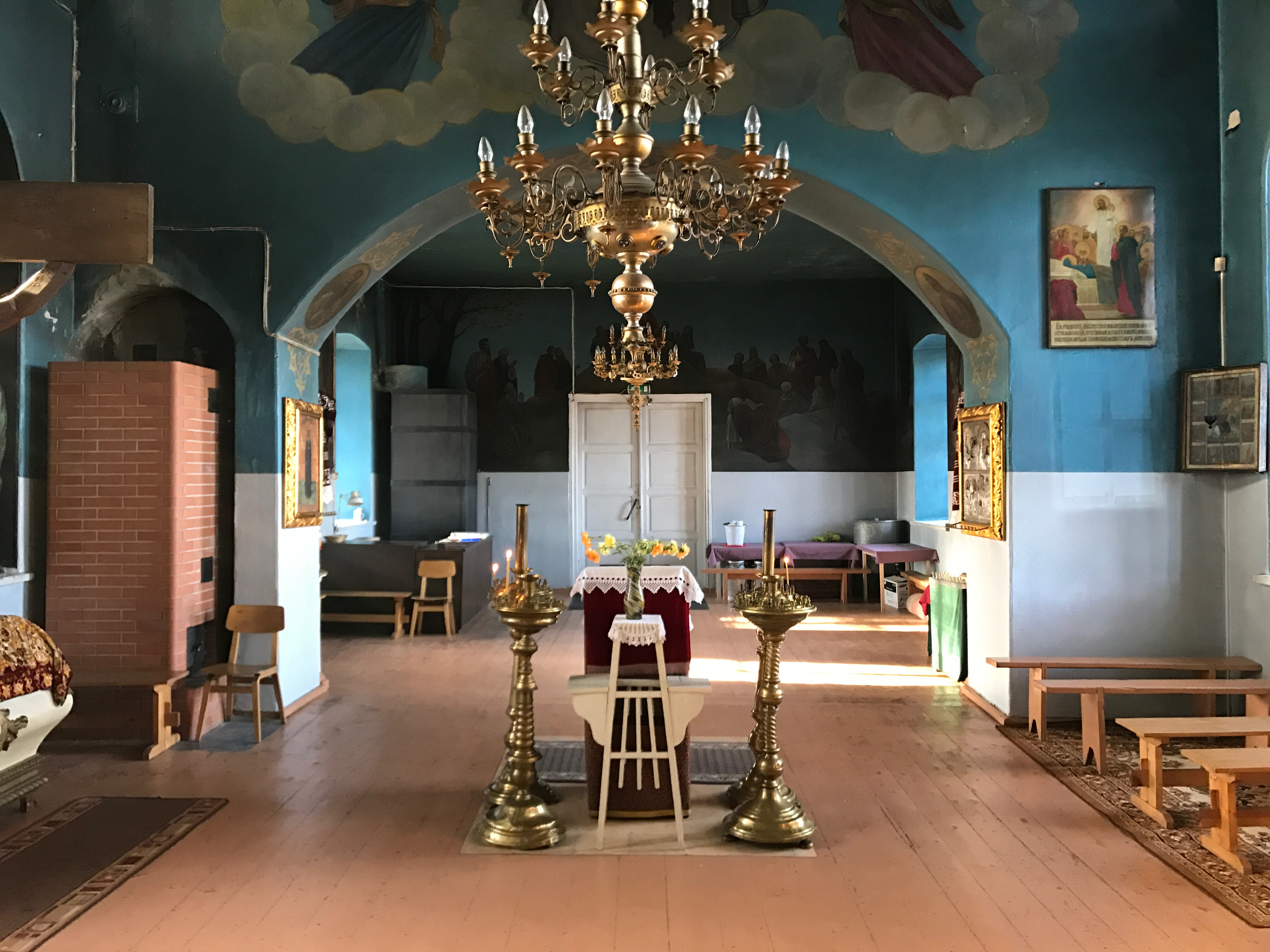 Värska Püha Georgiuse kiriku interjöör